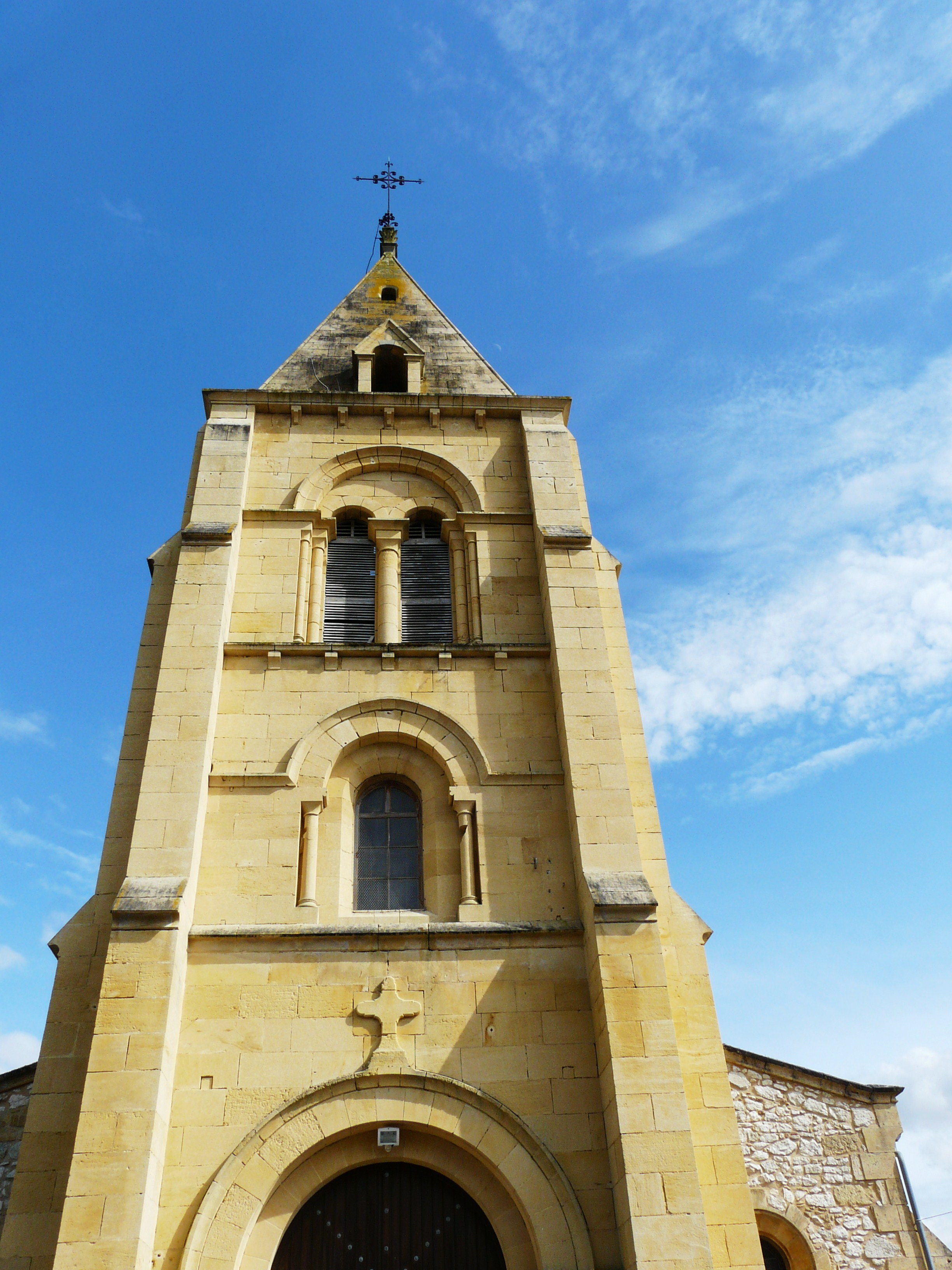 La façade ouest du clocher, église Saint-Jean-Baptiste, Gardonne, Dordogne, France.